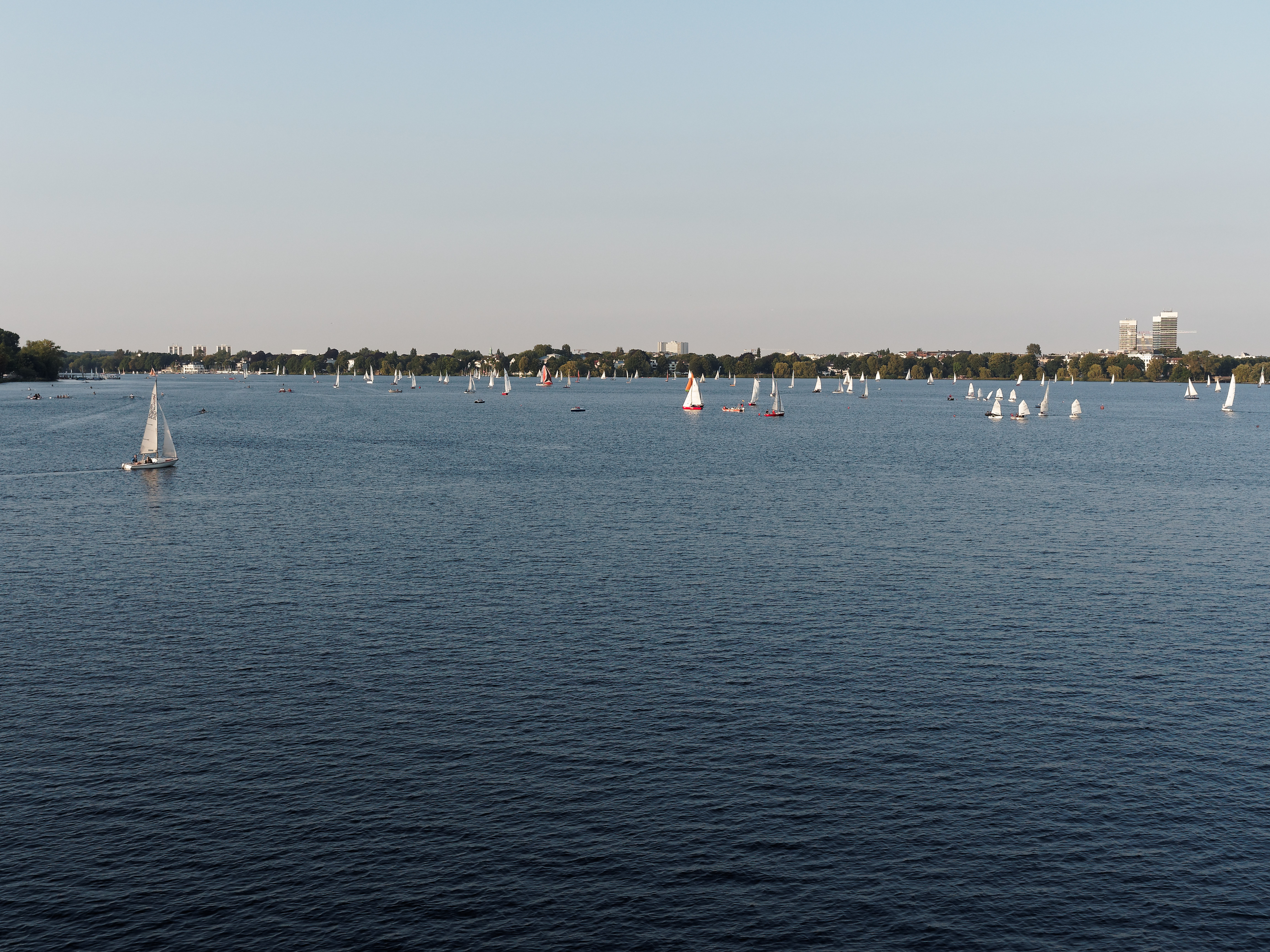 Segelboote auf der Außenalster, gesehen von der Kennedy-Brücke, Hamburg)